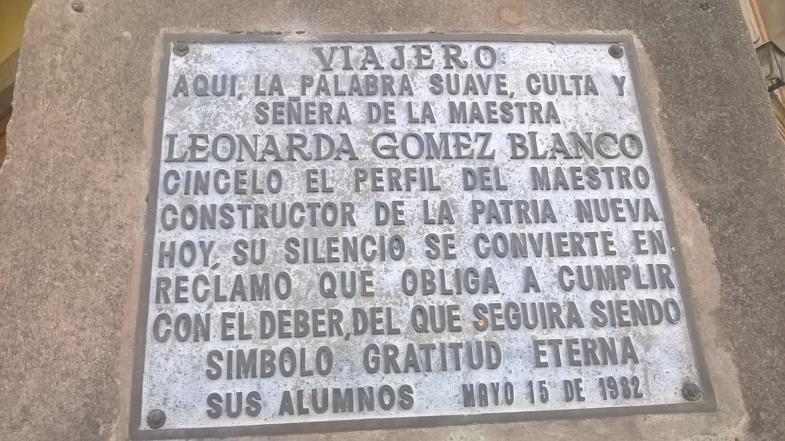 Placa de la maestra Leonardo Gómez Blanco en Huamantla, Tlaxcala